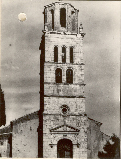 Iglesia de San Pelayo. Torre - Barcial de la Loma (Valladolid) - Cuaderno. Álbum de Valladolid - Fotografía 42 x 60 B/N